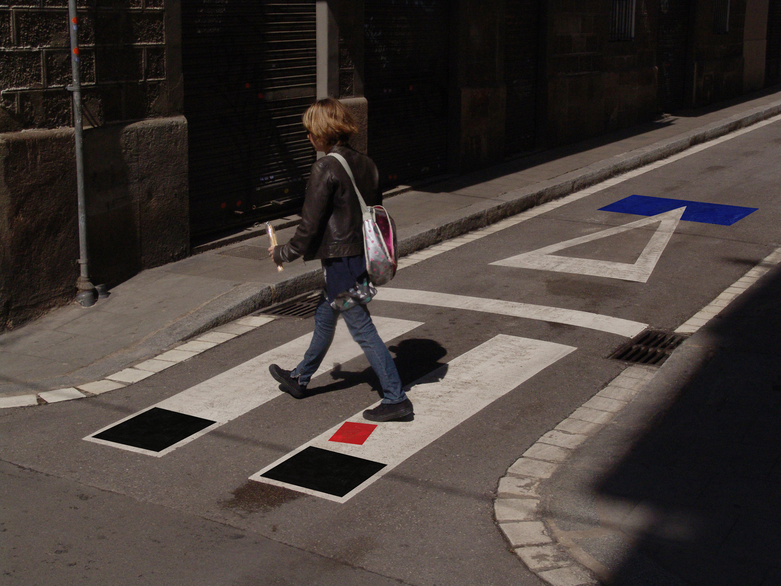 Quadrats negres i quadrat vermell amb triangle col·locats en el barri de Gracia carrer Pere Serafá cantonada amb Ros de Olano. Aquesta obra fa part del projecte RememberKasimir Malevich.